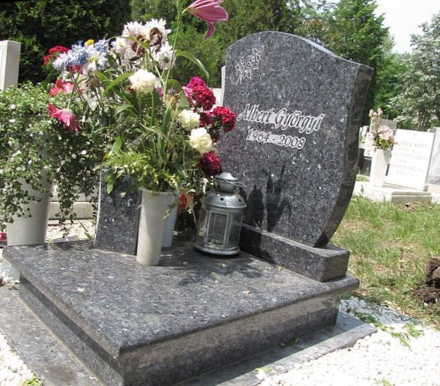 Albert Györgyi (Budapest, 1964. - Budapest, 2008) tévés személyiség, újságíró sírja Budapesten. Csepeli temető: 34-0-1-41